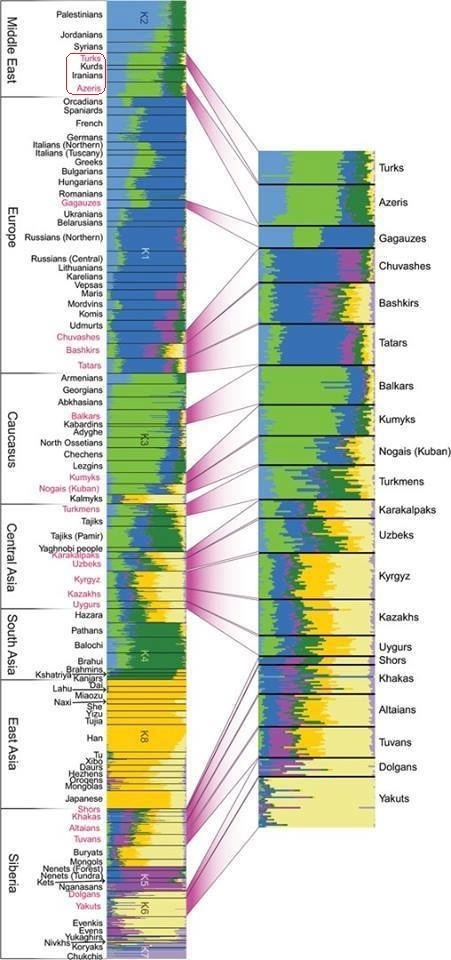 Генетическое родство курдов с ассимилированными тюркоязычными азербайджанцами и турками, а также тривиальное родство с остальными иранцами